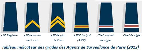 grade ASP¨agent surveillance paris uniforme patte epaule